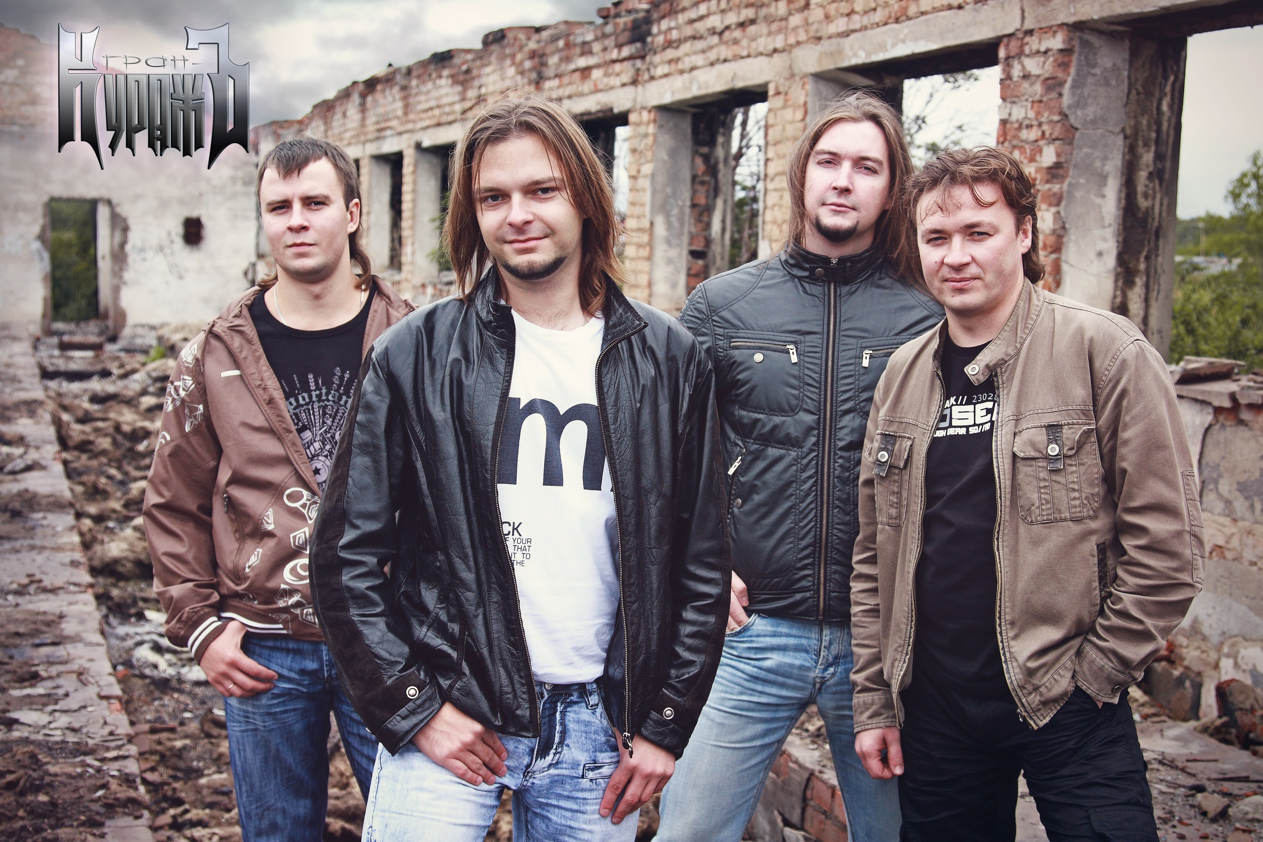 Фотосессия группы Гран-КуражЪ в 2010г.